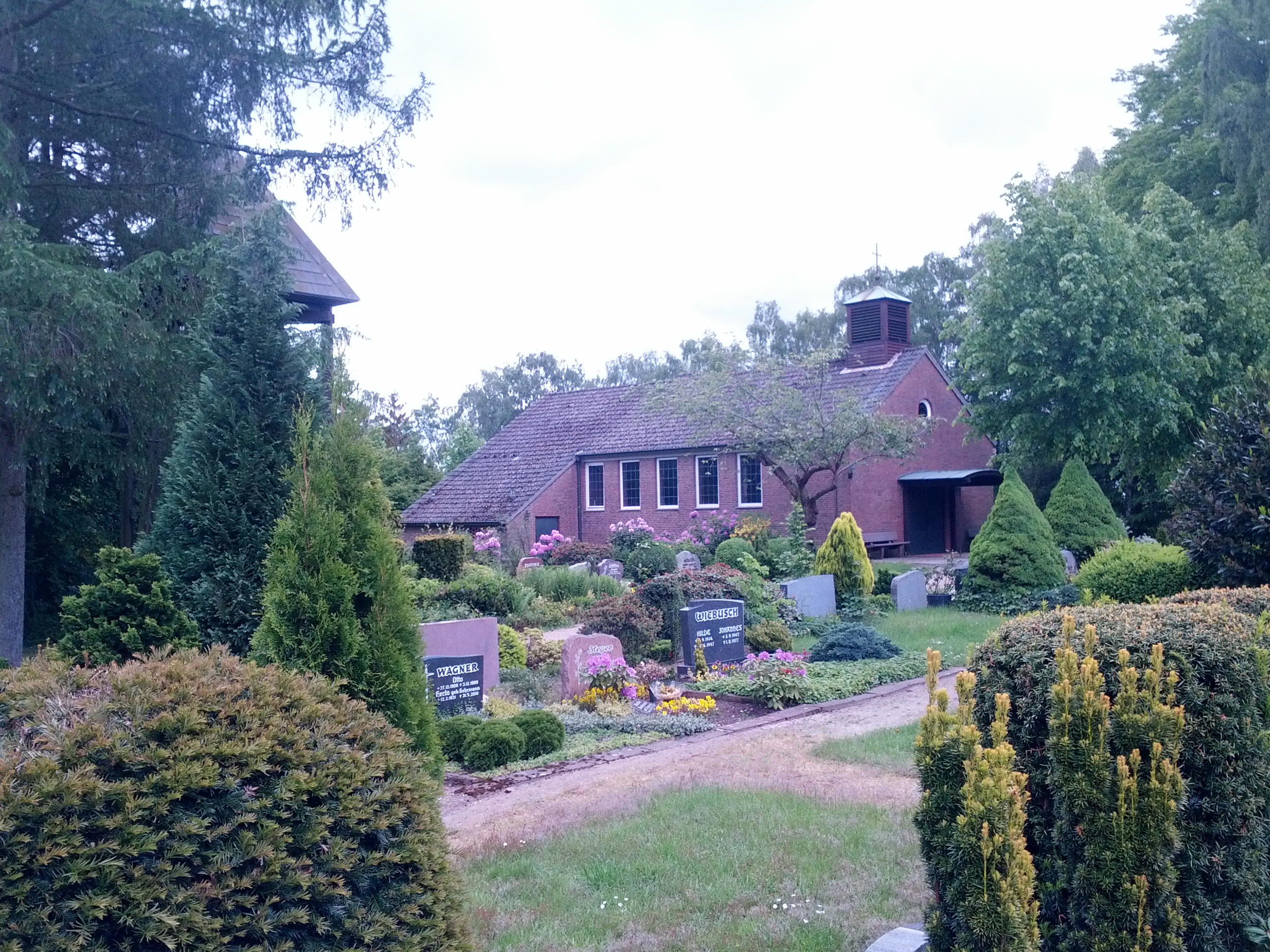 Kapell op’n Karkhoff von Hornborg (Waldkarkhoff)